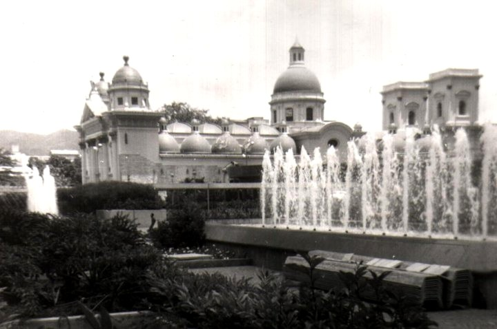 Plaza digo Ibarra y al fondo Basilica de Santa Teresa en Caracas - Venezuela (1970)